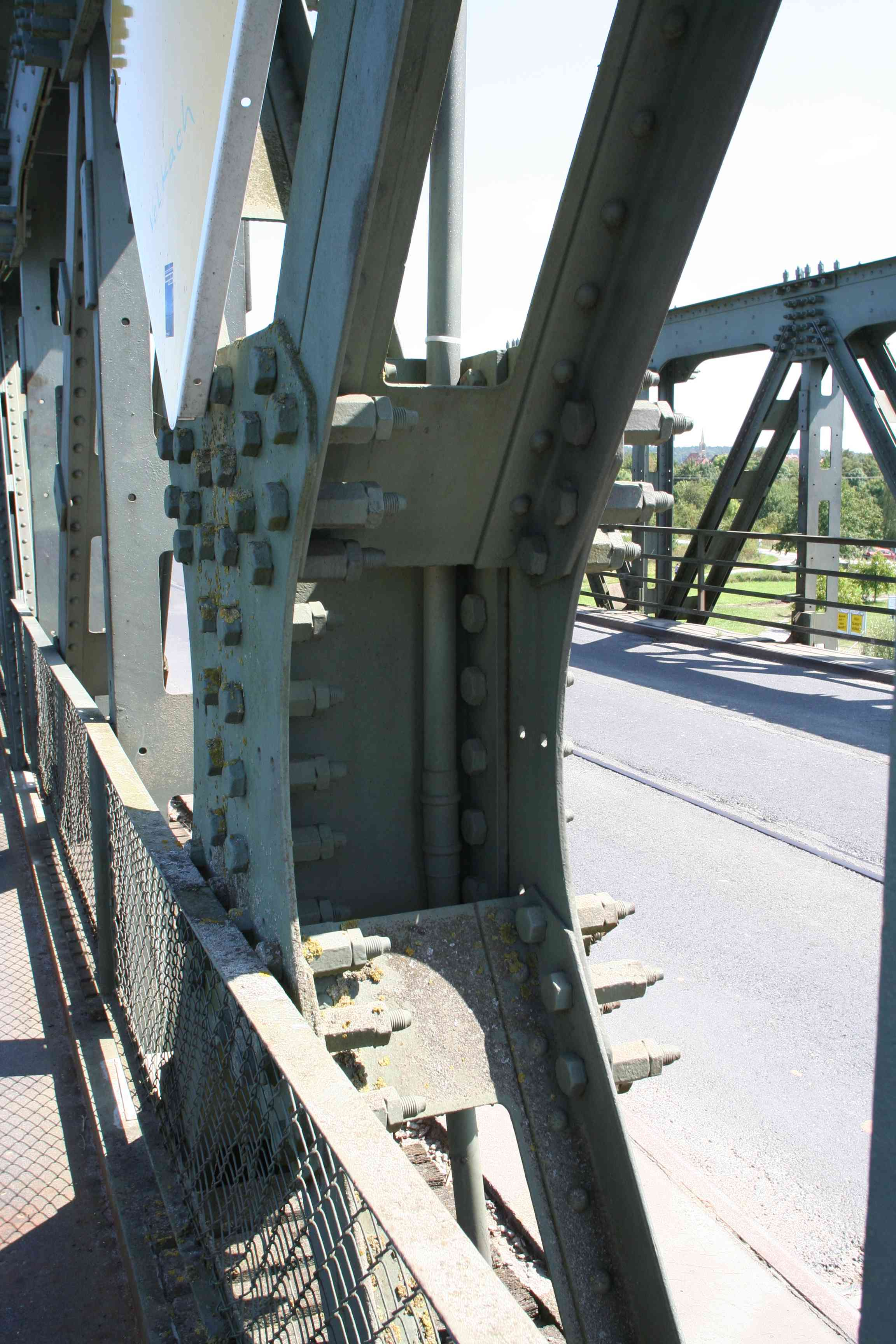 Mainbrücke Volkach, Landkreis Kitzingen, Unterfranken